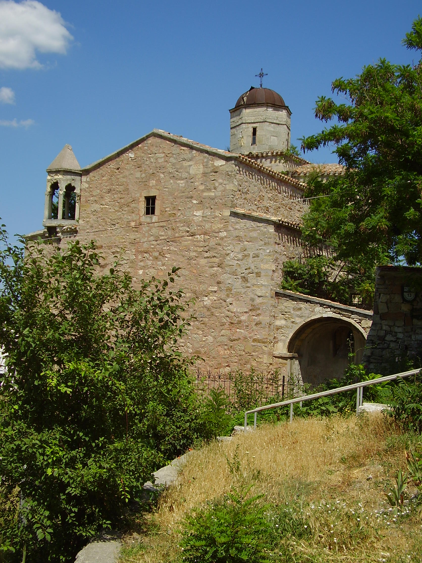 Церква архангелів (церква Гавриїла та Михаїла), Феодосія, вул. Вірменська, 11